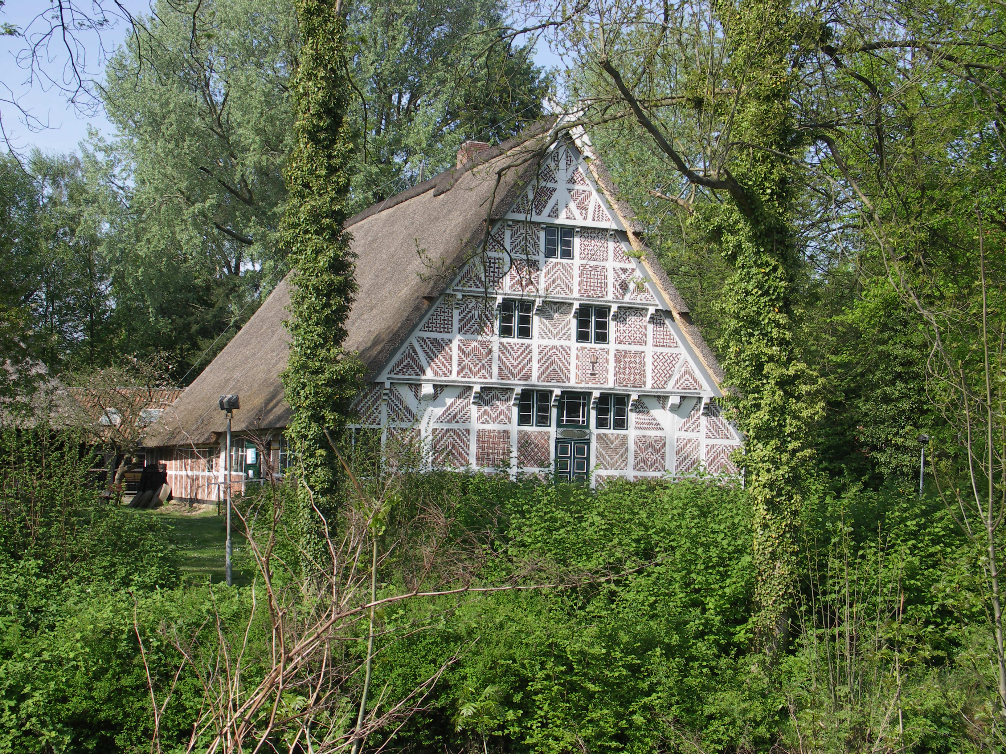 Altländerhaus im Freilichtmuseum auf der Insel in Stade